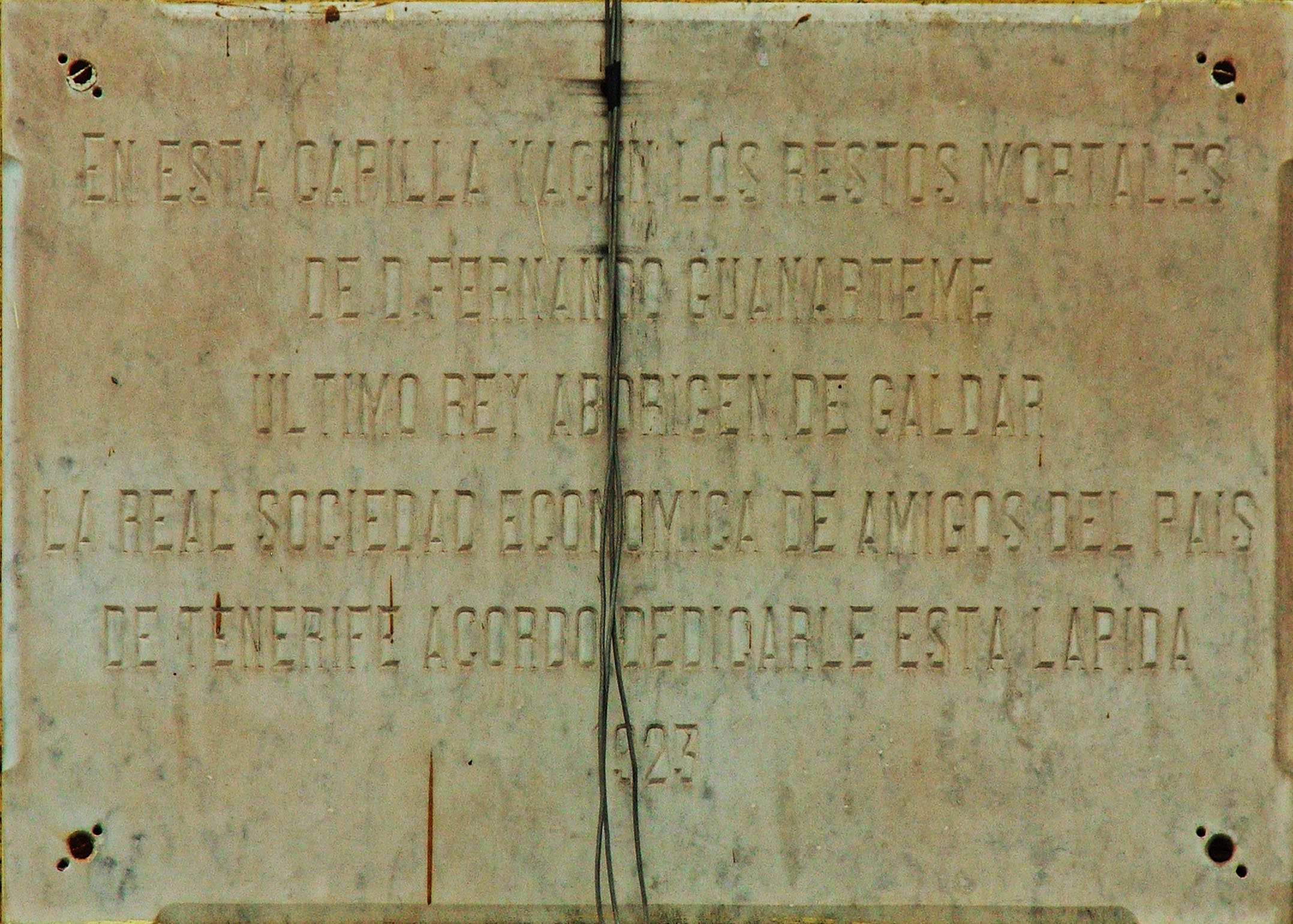 EN ESTA CAPILLA YACEN LOS RESTOS MORTALES DE D. FERNANDO GUANARTEME ULTIMO REY ABORIGEN DE GALDAR LA REAL SOCIEDAD ECONOMICA DE AMIGOS DEL PAIS DE TENERIFE ACORDO DEDICARLE ESTA LAPIDA 1923